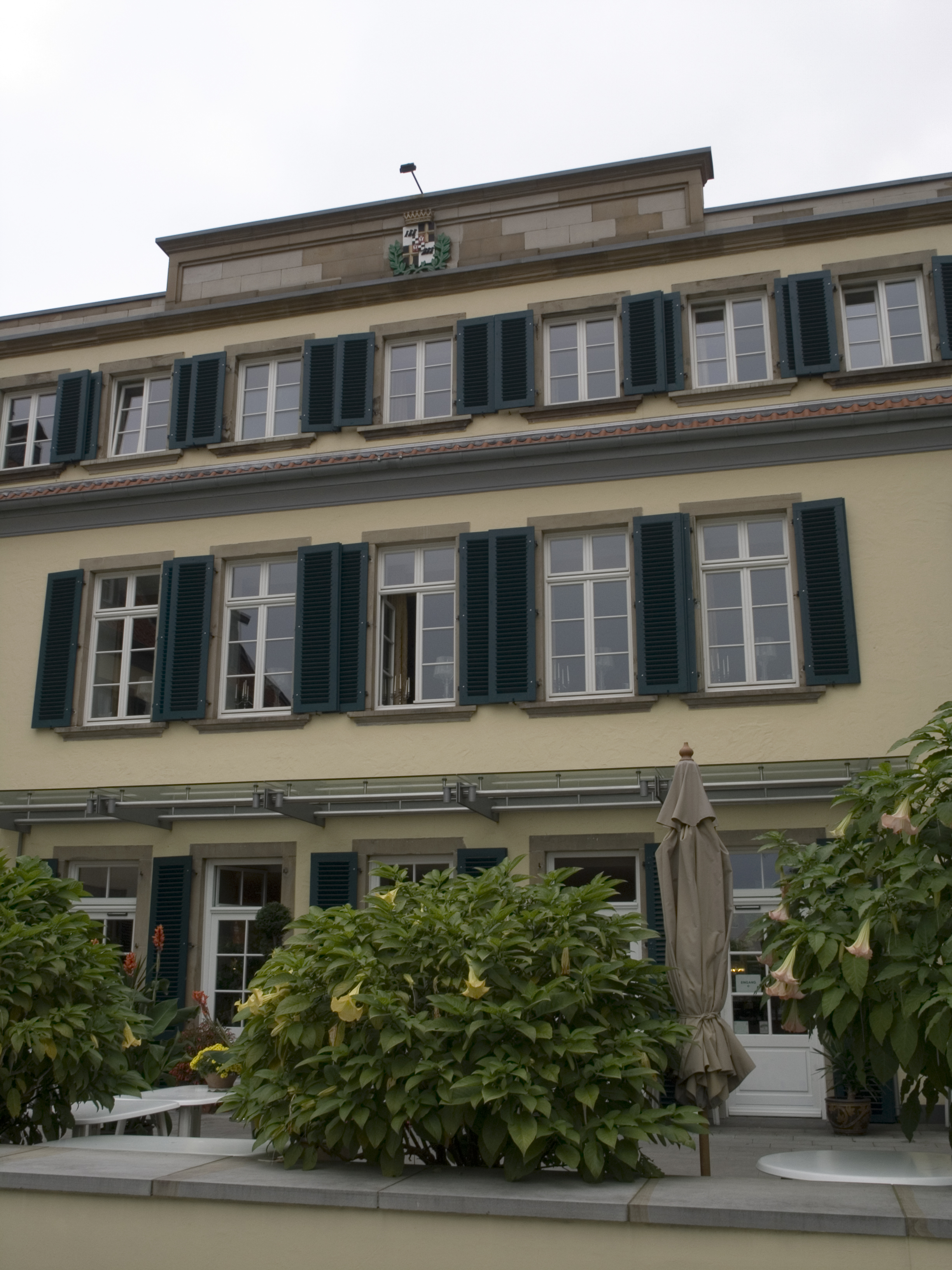 Северный Рейн - Вестфалия, Гельзенкирхен - замок Берге